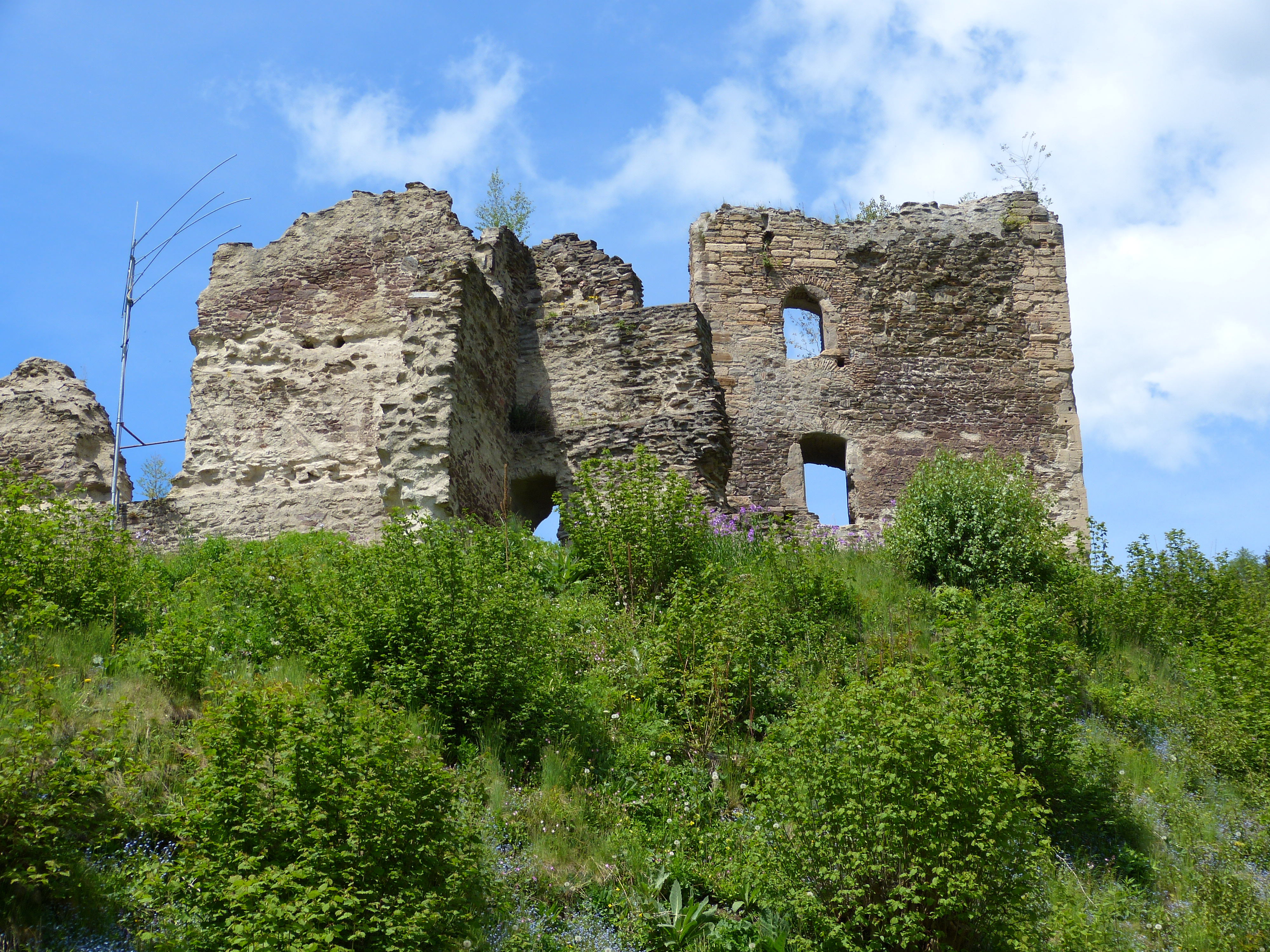 Burgruine Fohnsdorf